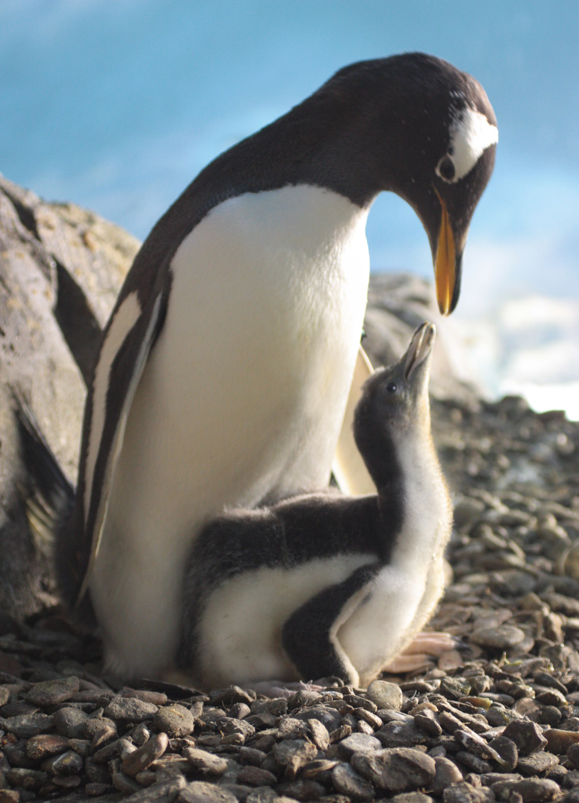 madre pinguino y cría en Faunia